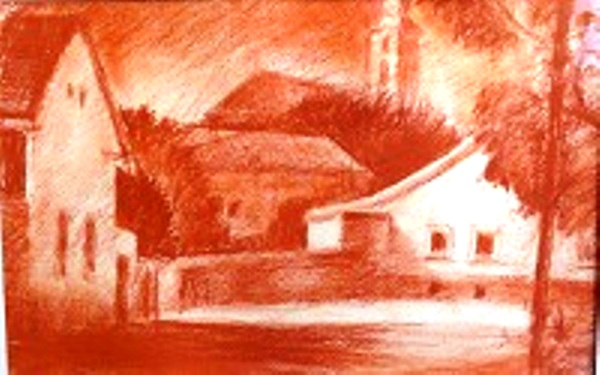 dr. Csics Miklós Ybl-díjas építész grafikája 1955-ből a „Szentendrei Vázlatok” sorozatból